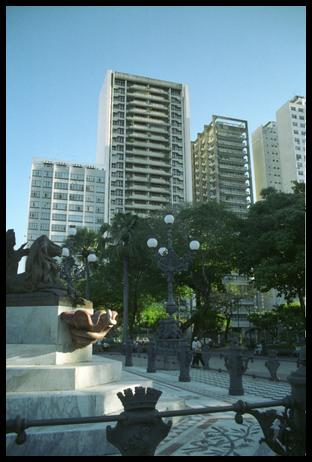 Campo Grande Square. Author: Bruno da Silva Lessa City: Salvador (Bahia) Country: Brazil